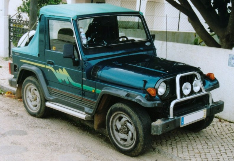 Quelle: Harald H. Linz Fotograf: Harald H. Linz Mit Genehmigung von Harald. H. Linz für Wiki eingestellt.